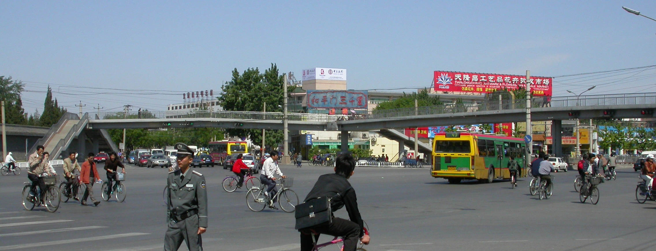 skyway in beijing taken in beijing.